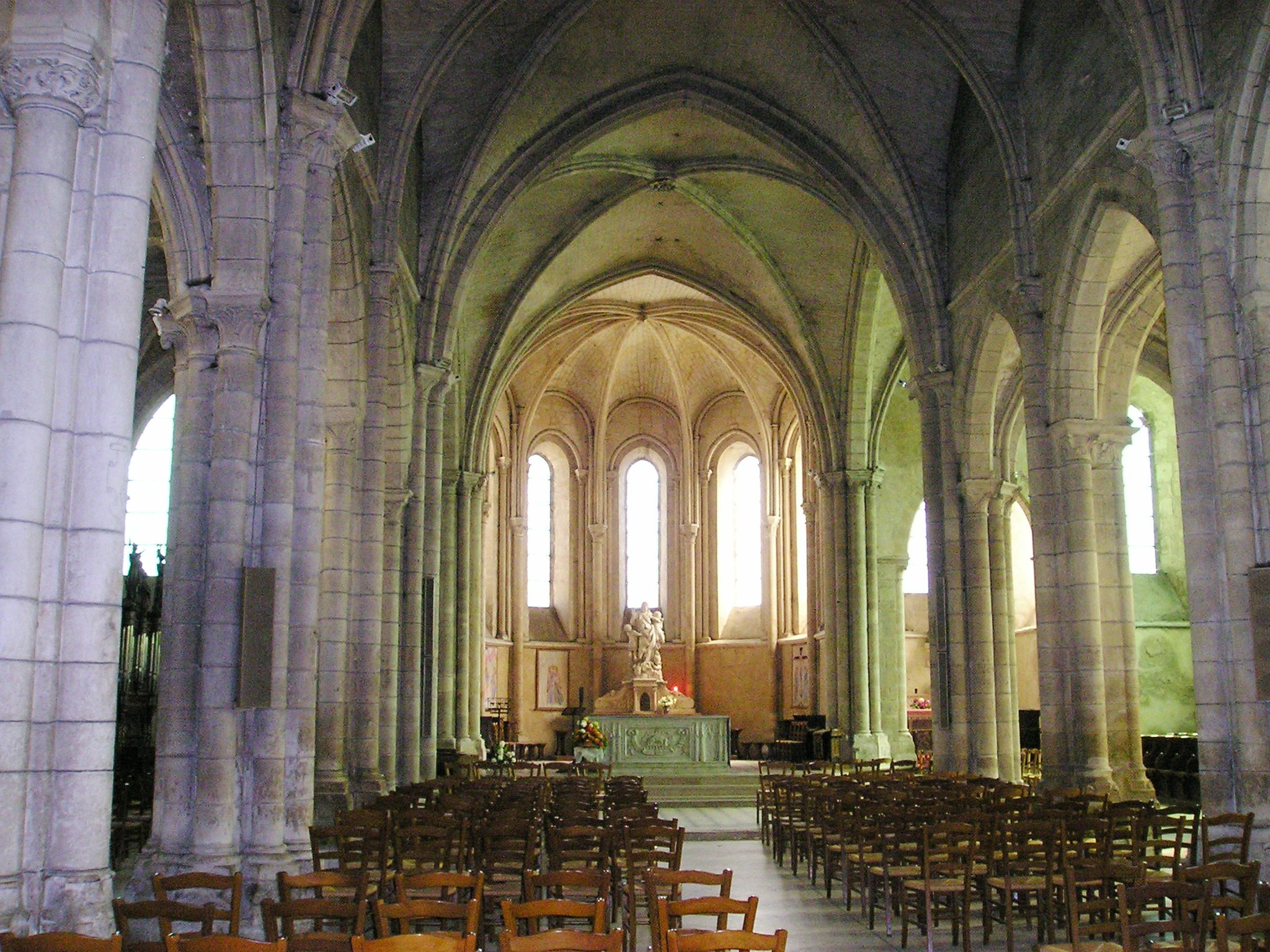 Pont-sur-Yonne,_Kircheninneres